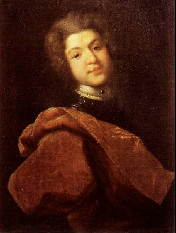 Портрет барона Сергея Григорьевича Строганова (1707-1756) 1726 г, холст, масло, 87x65,5 см (овал, вписанный в прямоугольник) Государственный Русский музей, Санкт-Петербург